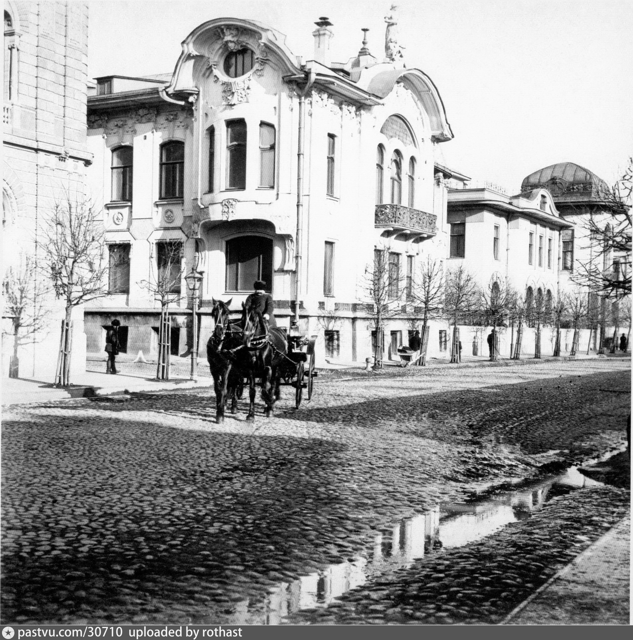 Исторический снимок особняка Миндовского. Москва, Поварская улица, 44/2.